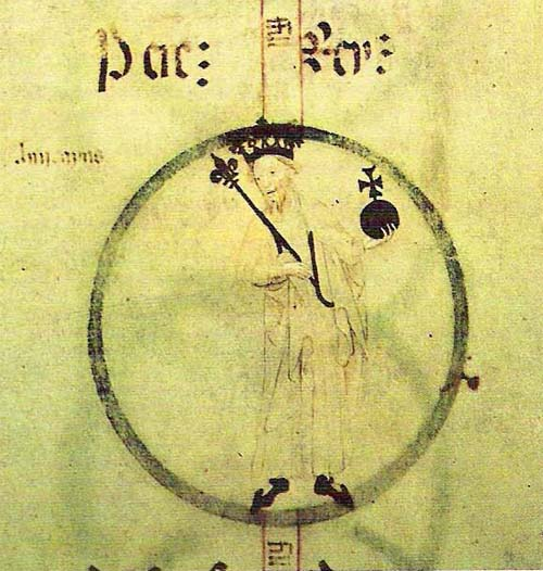 Rotlle genealògic del Monestir de Poblet